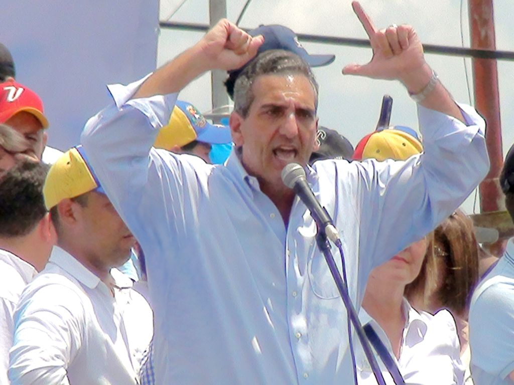 Discurso durante la marcha por la Paz el 22 de febrero de 2014